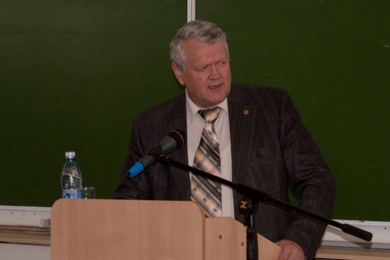 Академик А.Л. Асеев